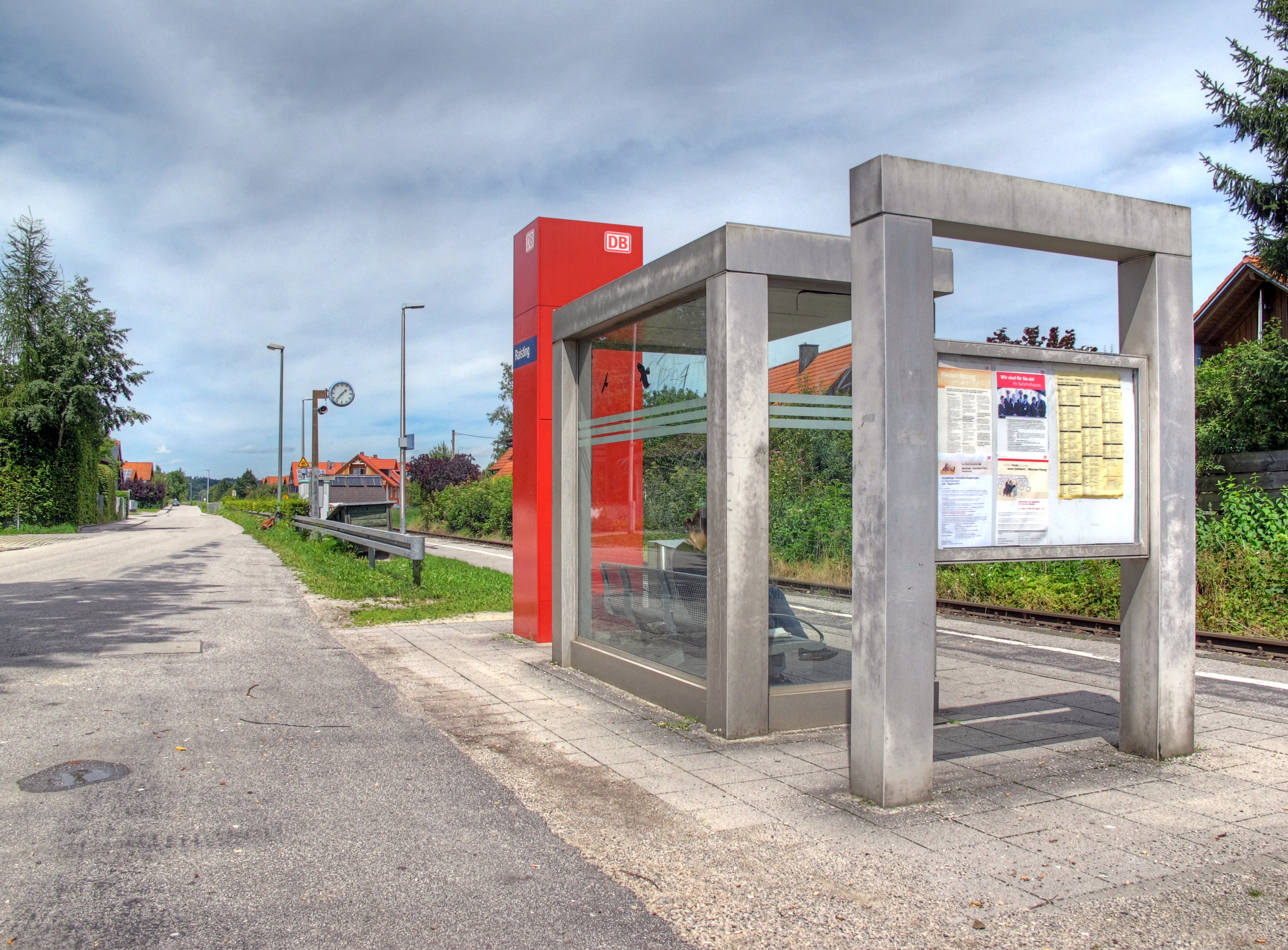 Deutschland, Bayern, Oberbayern, Regierungsbezirk Weilheim-Schongau, Gemeinde Raisting, Bahnhof